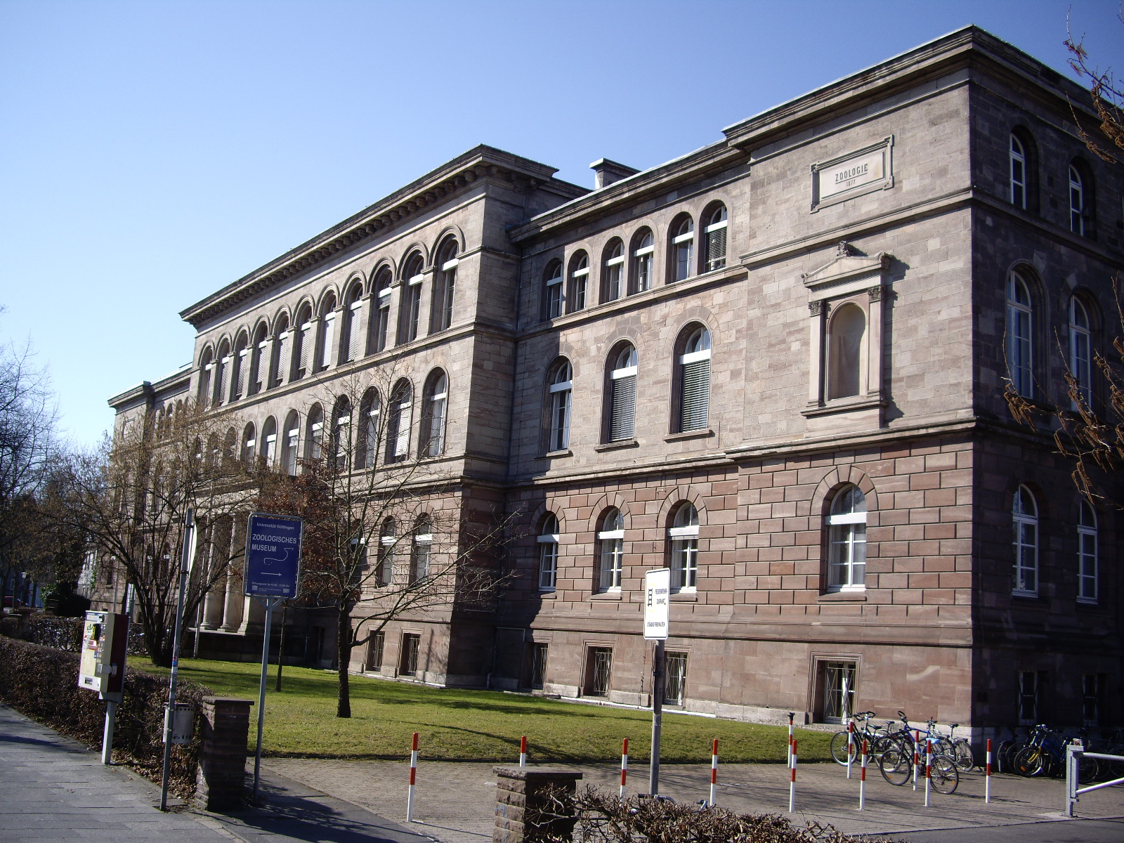 Zoologisches Institut, Universität Göttingen, Februar 2011. Foto: F. Welter-Schultes